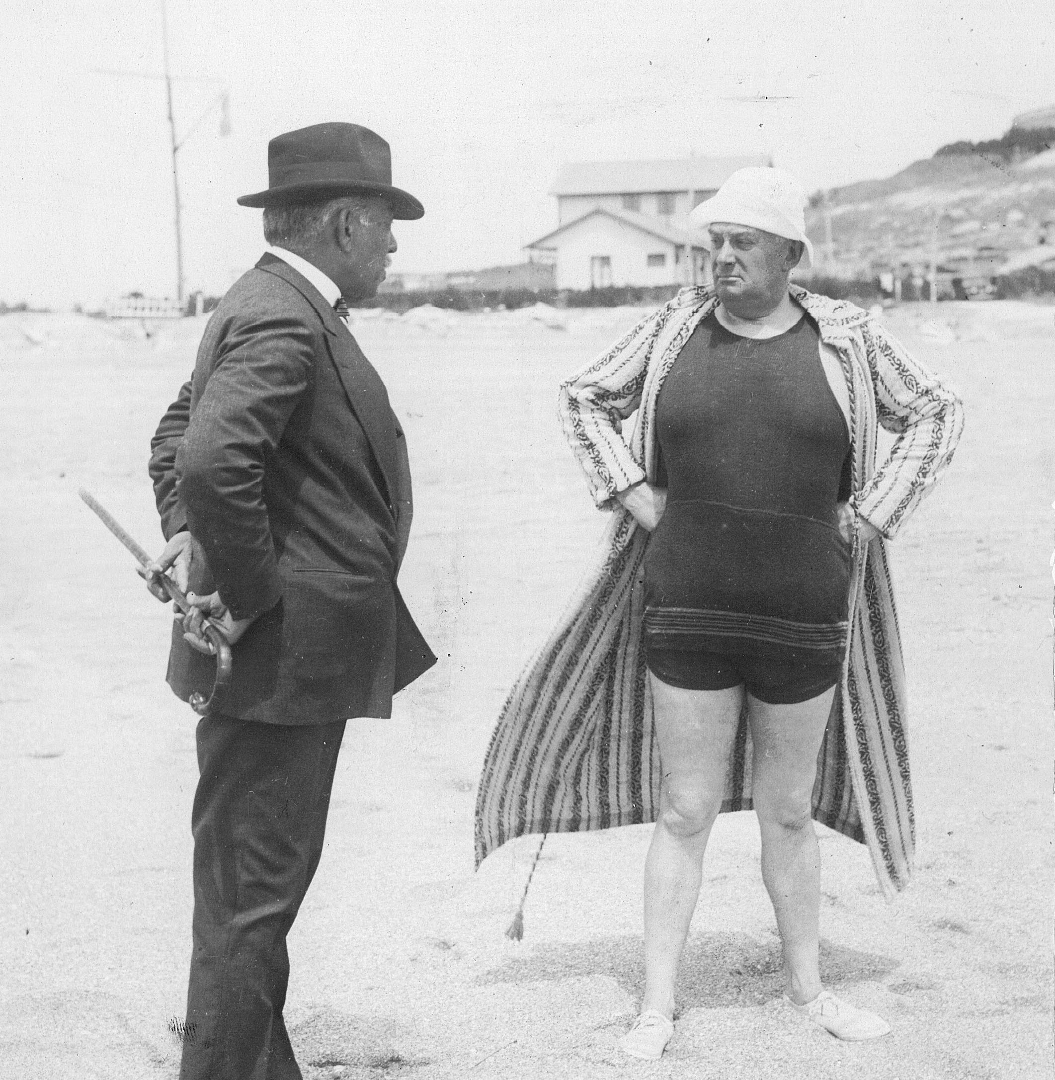 Presidente Marcelo T. de Alvear (der.) con su ministro de guerra, Agustín P. Justo (izq.) en Mar del Plata, 1925